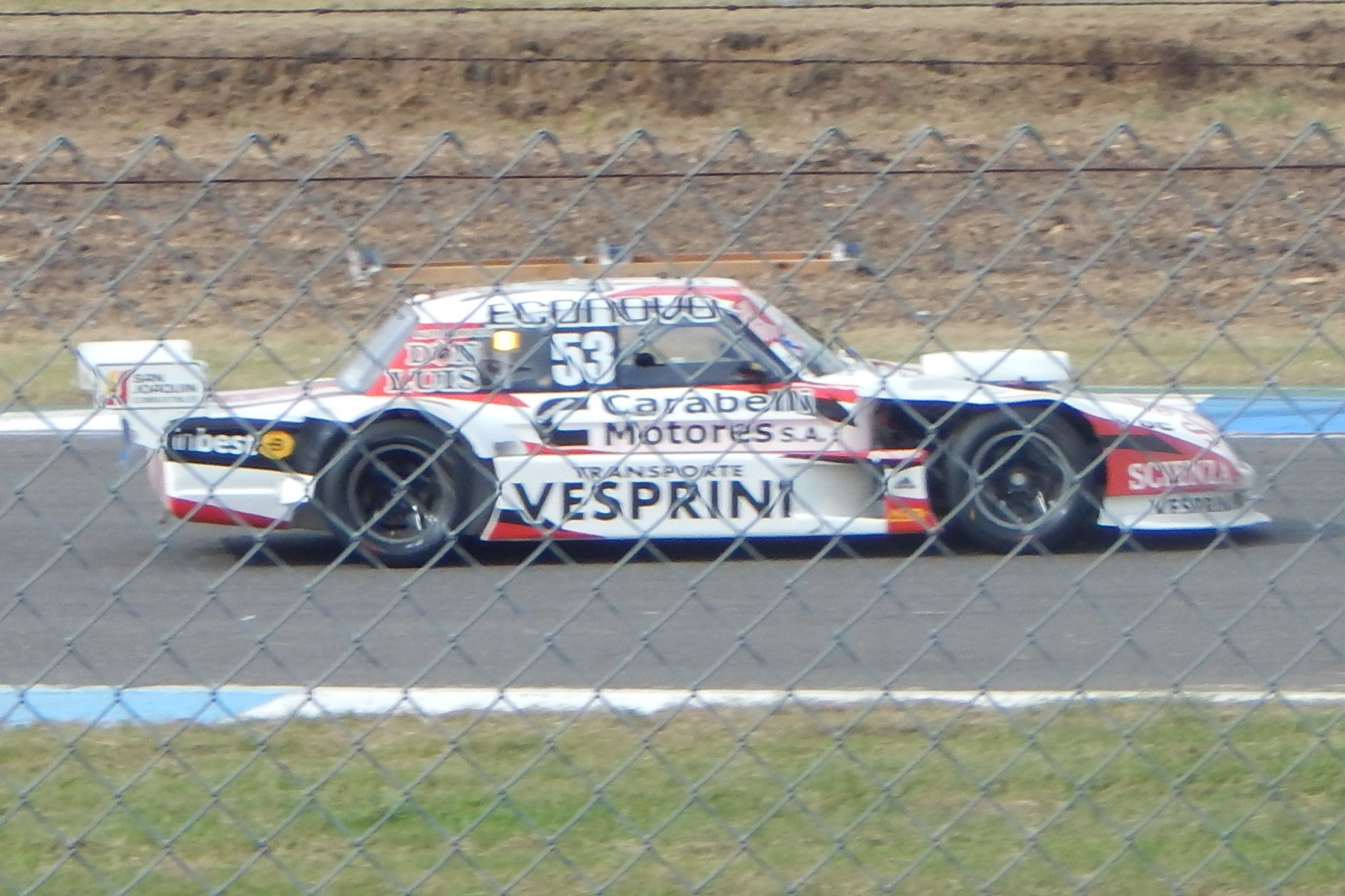 Juan Catalán Magni, TC Rafaela 2019.